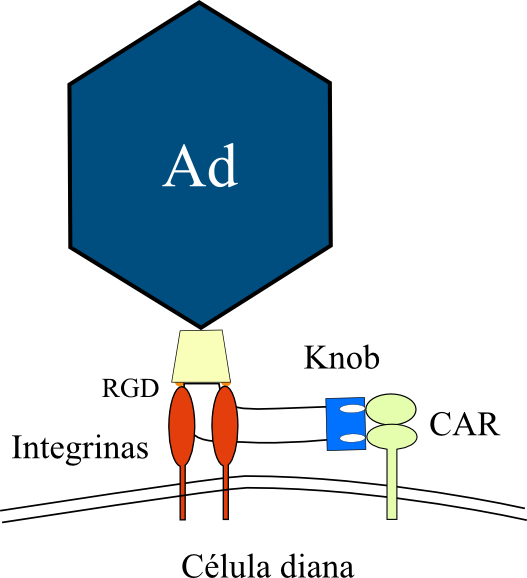 Los adenovirus wild type se unen a la célula mediante dos pasos. El primero es la unión del knob de la fibra al receptor primario, como puede ser CAR. El segundo paso es la unión del RGD con las integrinas de la membrana. Para que esto pueda suceder, el shaft de la fibra tiene que doblarse.